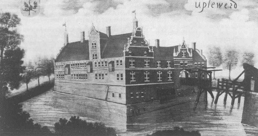 Burg Upleward. Öl auf Holz um 1600. Fotografische Reproduktion nach dem original im Besitz des Fürsten Knyphausen in Lütetsburg. Links oben das Wappen der Inn- und Knyphausen, rechts die Inschrift Uplewerd